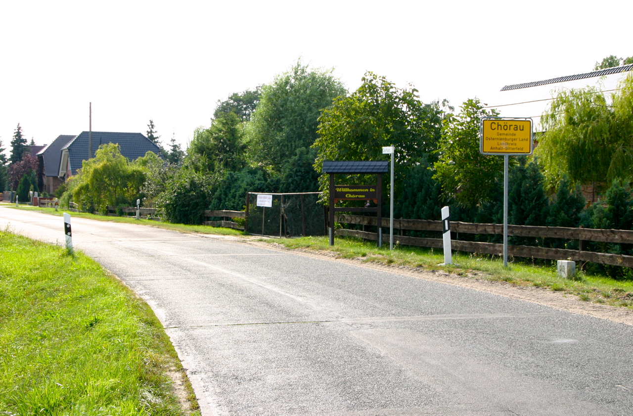 Chörau ist ein Ortsteil der Gemeinde Osternienburger Land im Landkreis Anhalt-Bitterfeld in Sachsen-Anhalt.